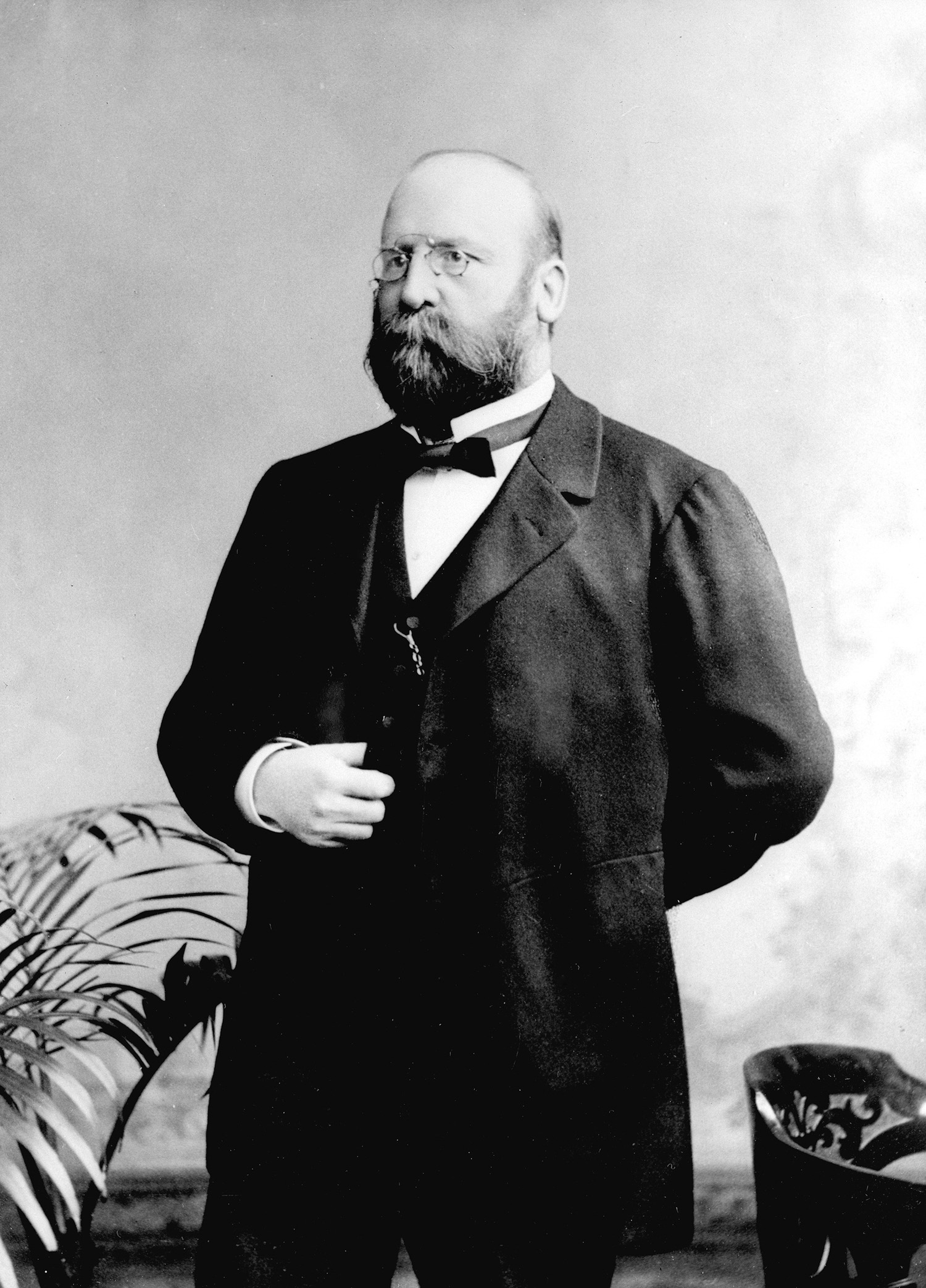 Porträtfoto des Wilhelm Küchler (1846–1900)